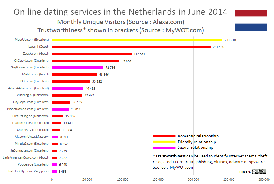 On line dating services in Netherlands in the Netherlands June 2014 Monthly Unique Visitors (Source : ) Trustworthiness* shown in brackets (Source : )